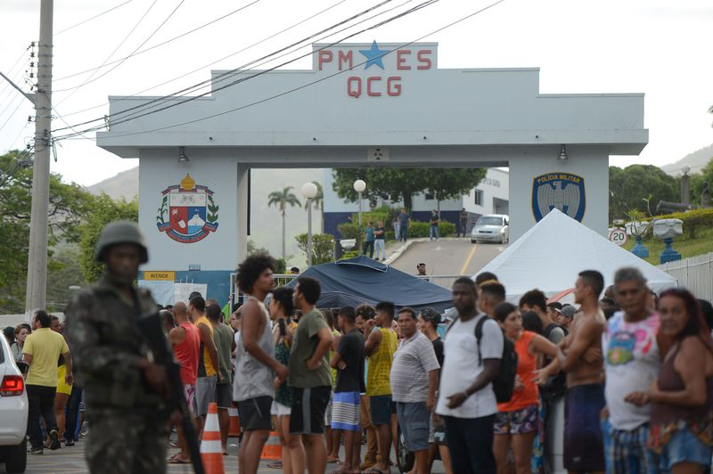 "Clima de tensão durante protesto de moradores em frente ao Comando Geral da Polícia Militar do Espírito Santo em Maruípe"